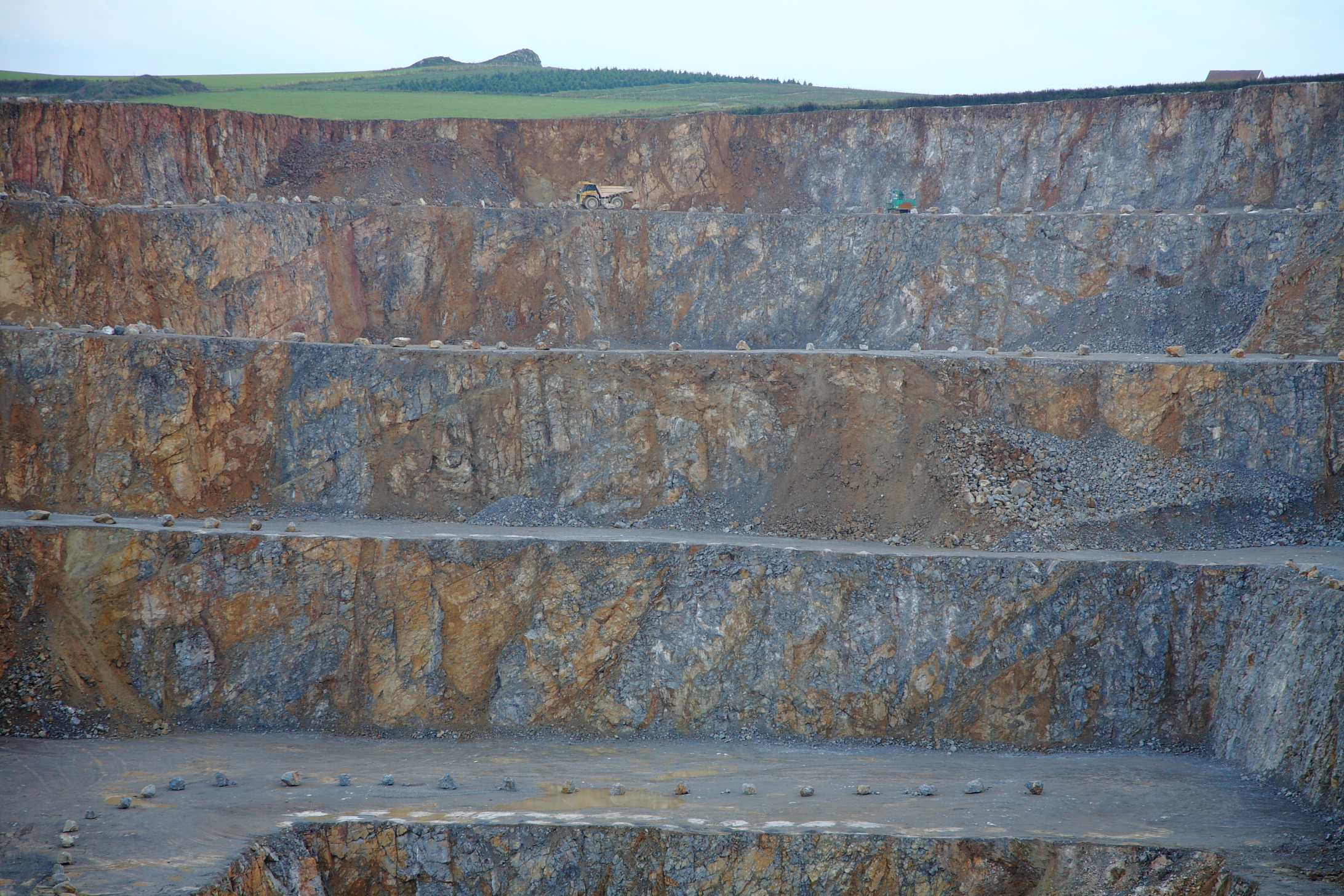 Mühlenbein Kalksteinbruch bei Brilon - Rösenbeck (im Hintergrund das Naturschutzgebiet "Am Battenfeld" mit 562,5 Meter Höhe, andere Namen der Felsen "Rösenbecker Stein" oder "Tittenberg".)